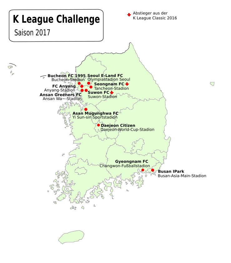 K League Challenge 2017 Spielorte